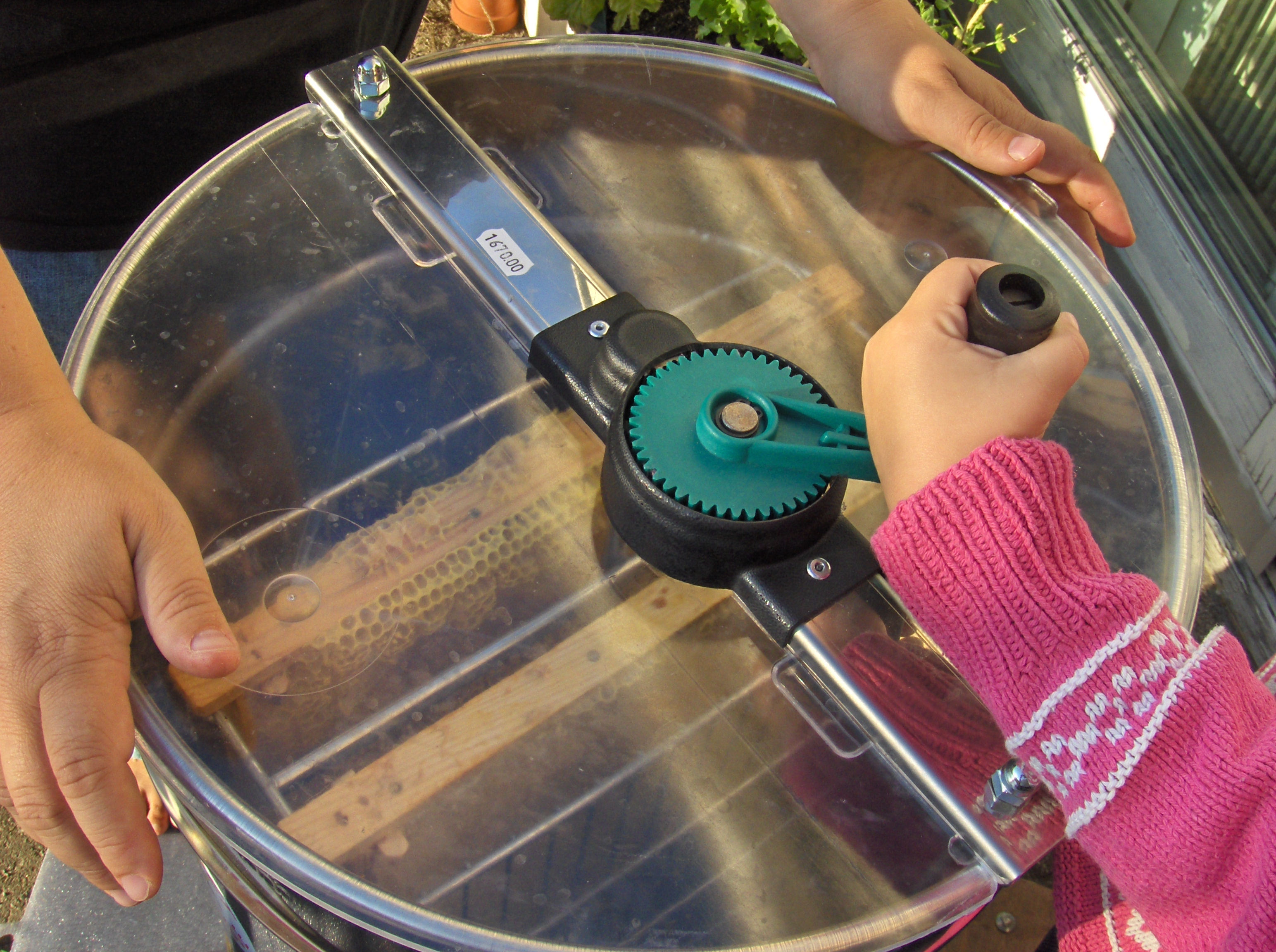 Slyngning af honning i lille honningslynge